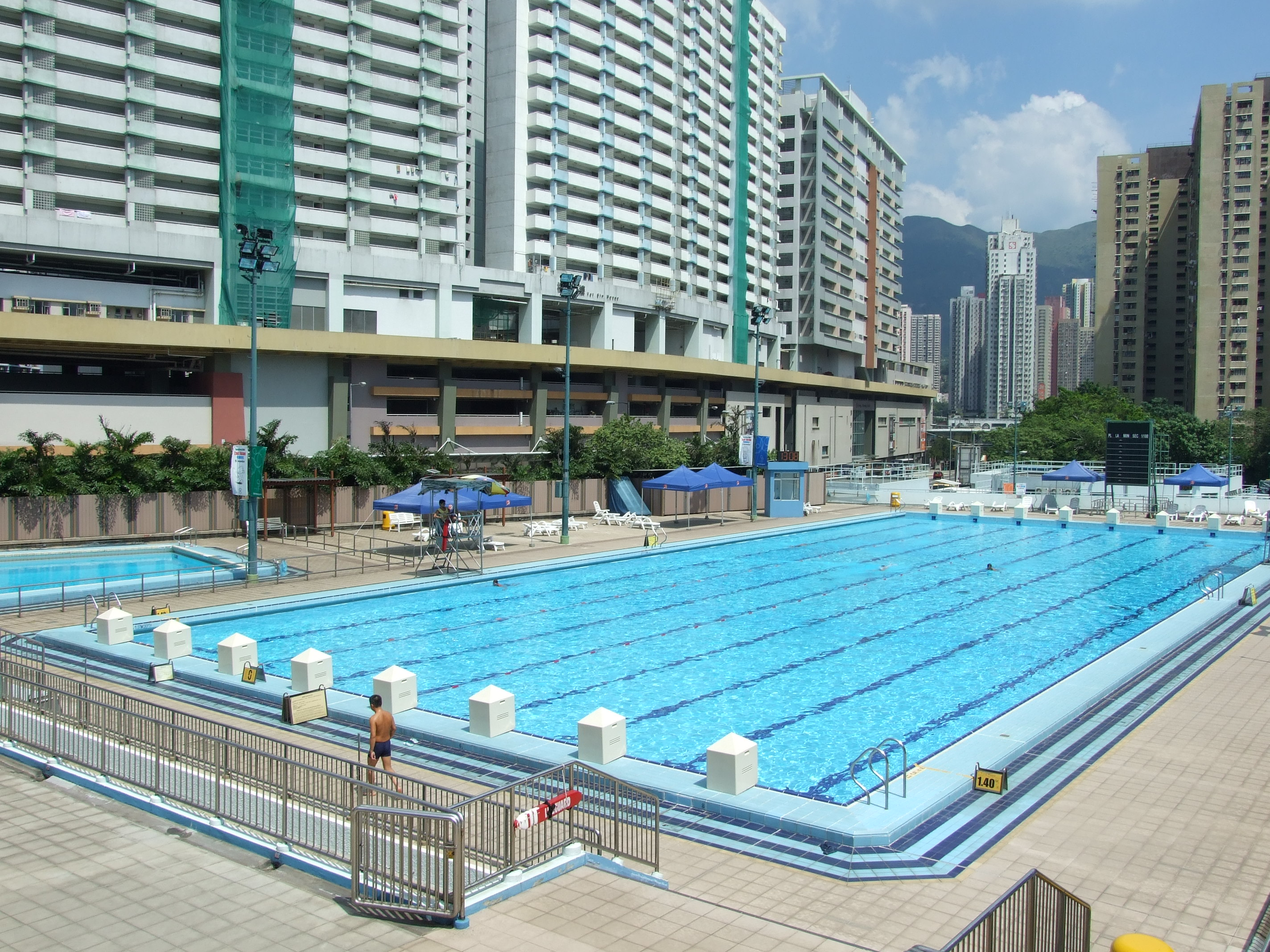 中文（香港）: 摩士公園游泳池主池